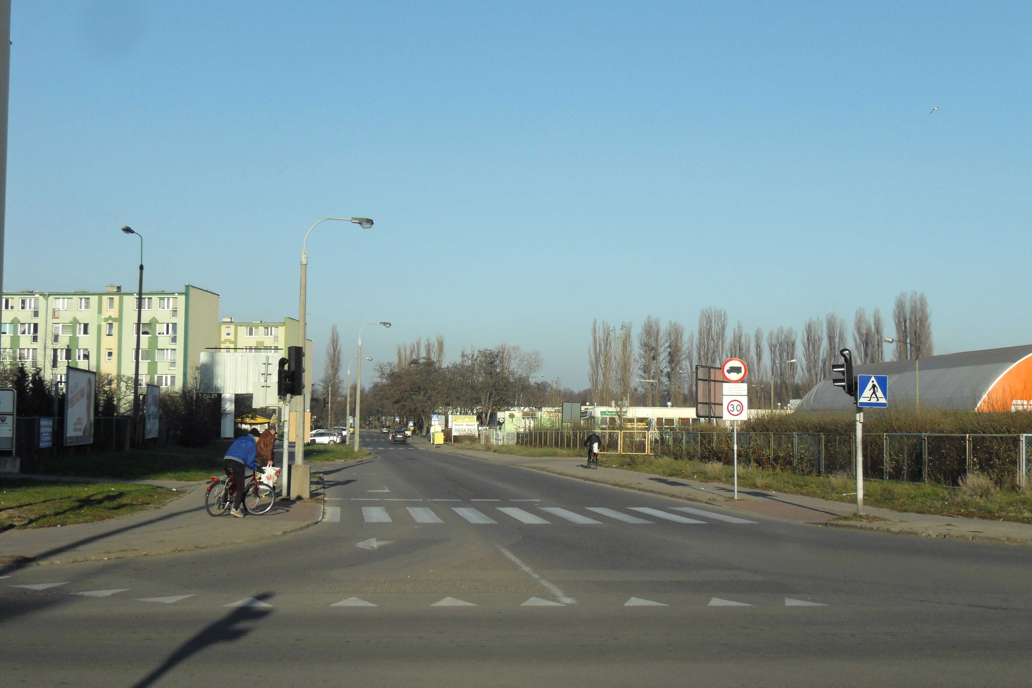 Gdańsk Przymorze Wielkie (Czerwony Dwór), ul. Dąbrowszczaków.